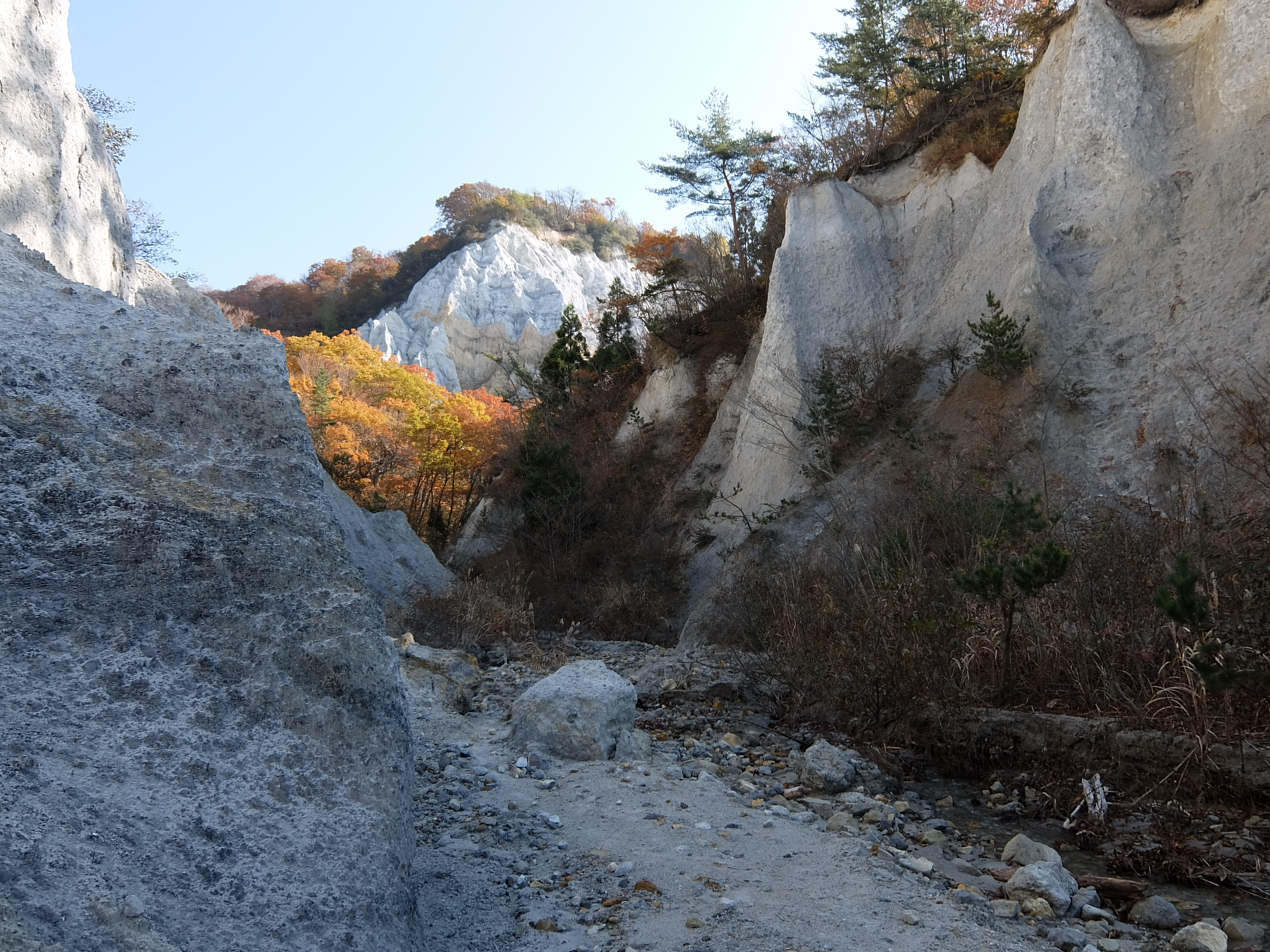 日本キャニオン 砂防ダム上部から影坂の池への道